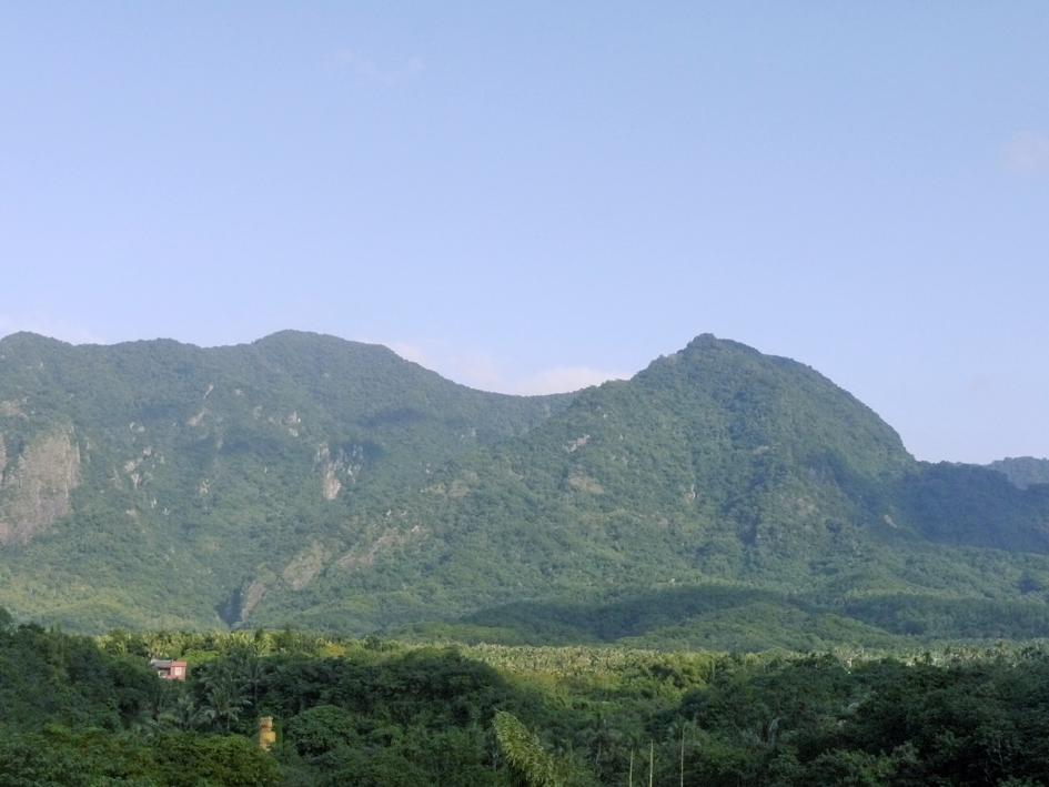 台東縣都蘭山